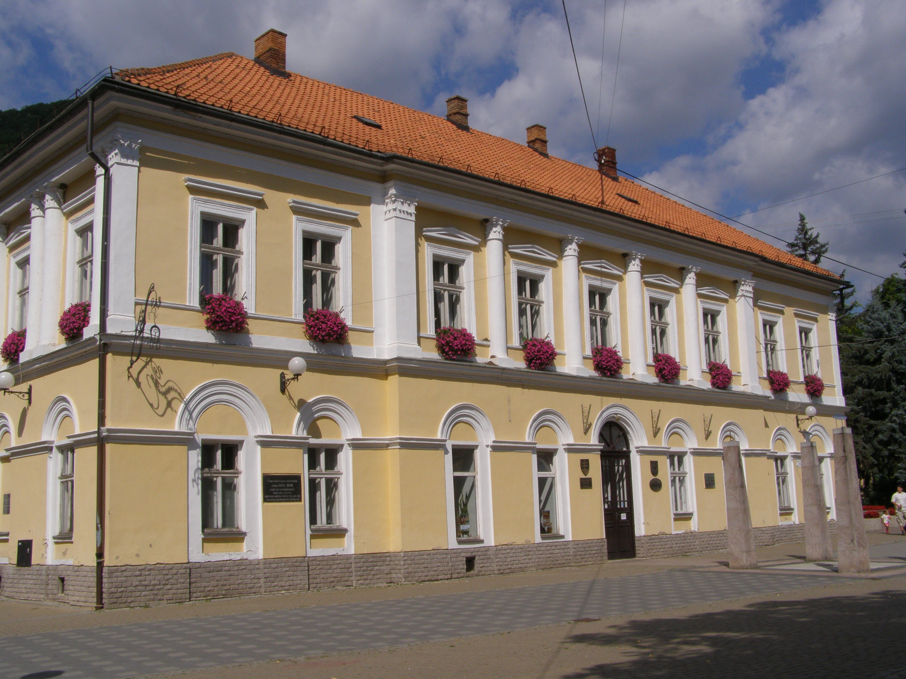 Tisovec (okres Rimavská Sobota), Městký úřad